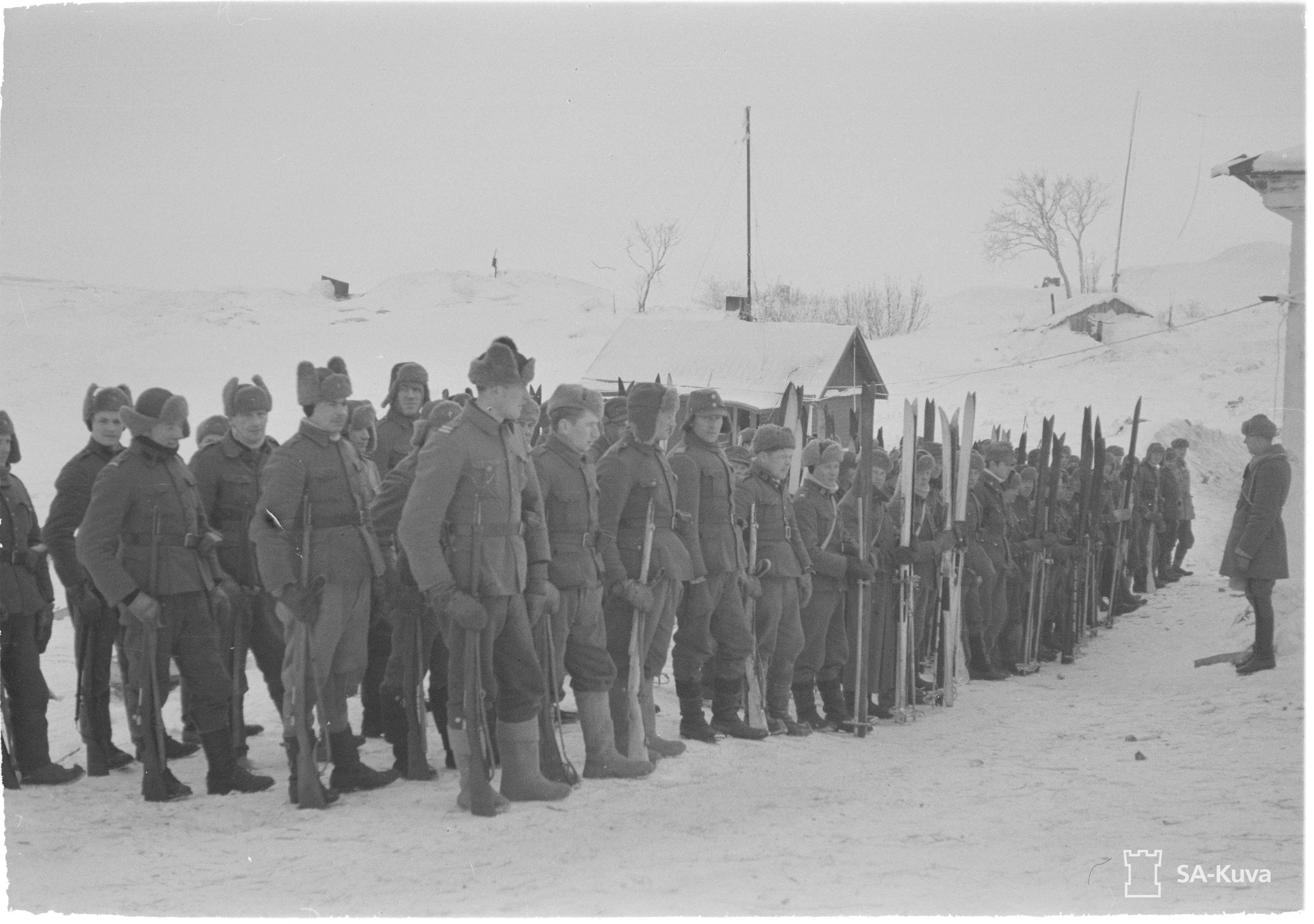 Kapteeni Veikko Rauhaniemi suorittamassa tehtävien jakoa Somerin tukikohdassa.